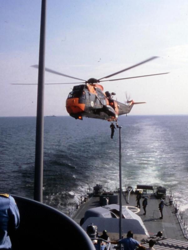 Hubschrauber Westland Sea King Mk 41 der Bundesmarine